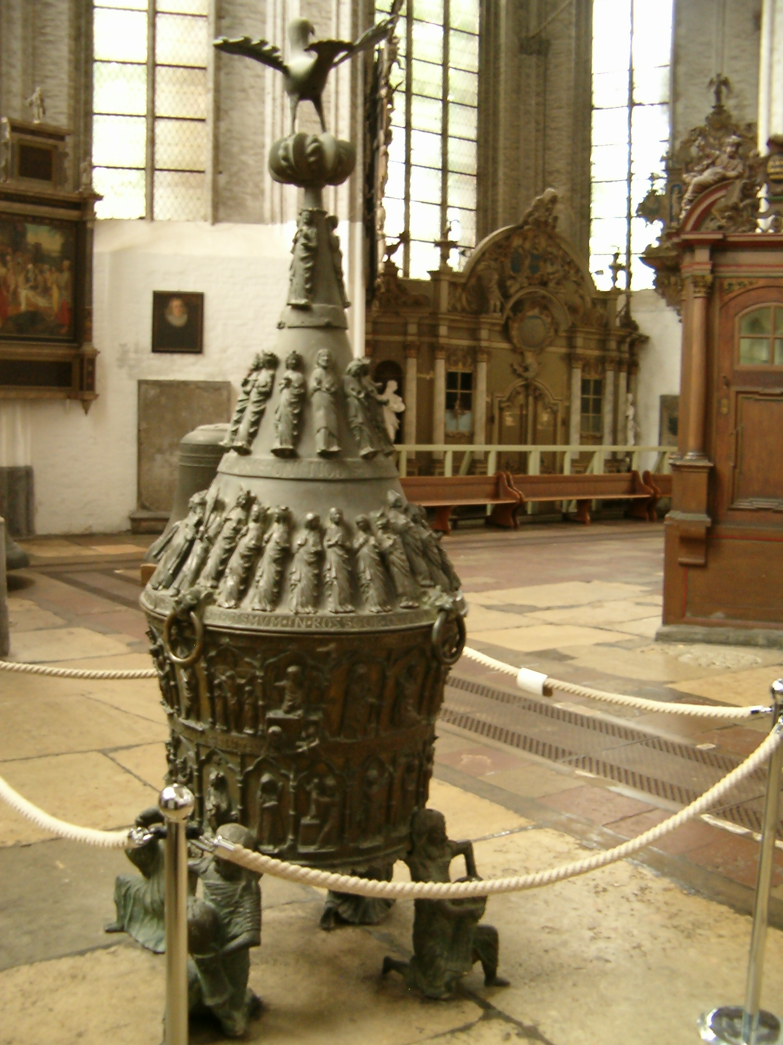 Bronzefünte in der Rostocker Marienkirche